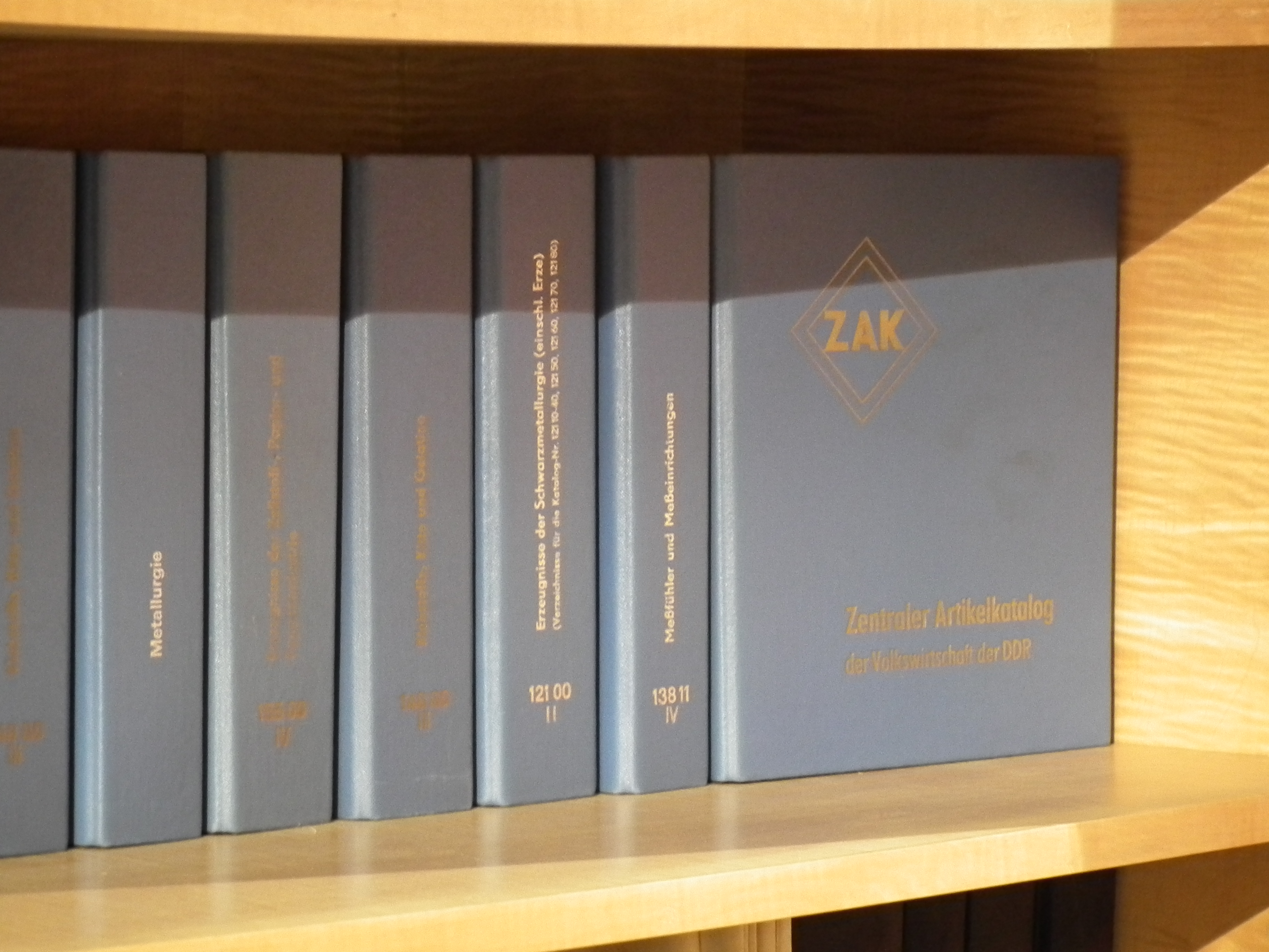 Dresden - Die Welt der DDR